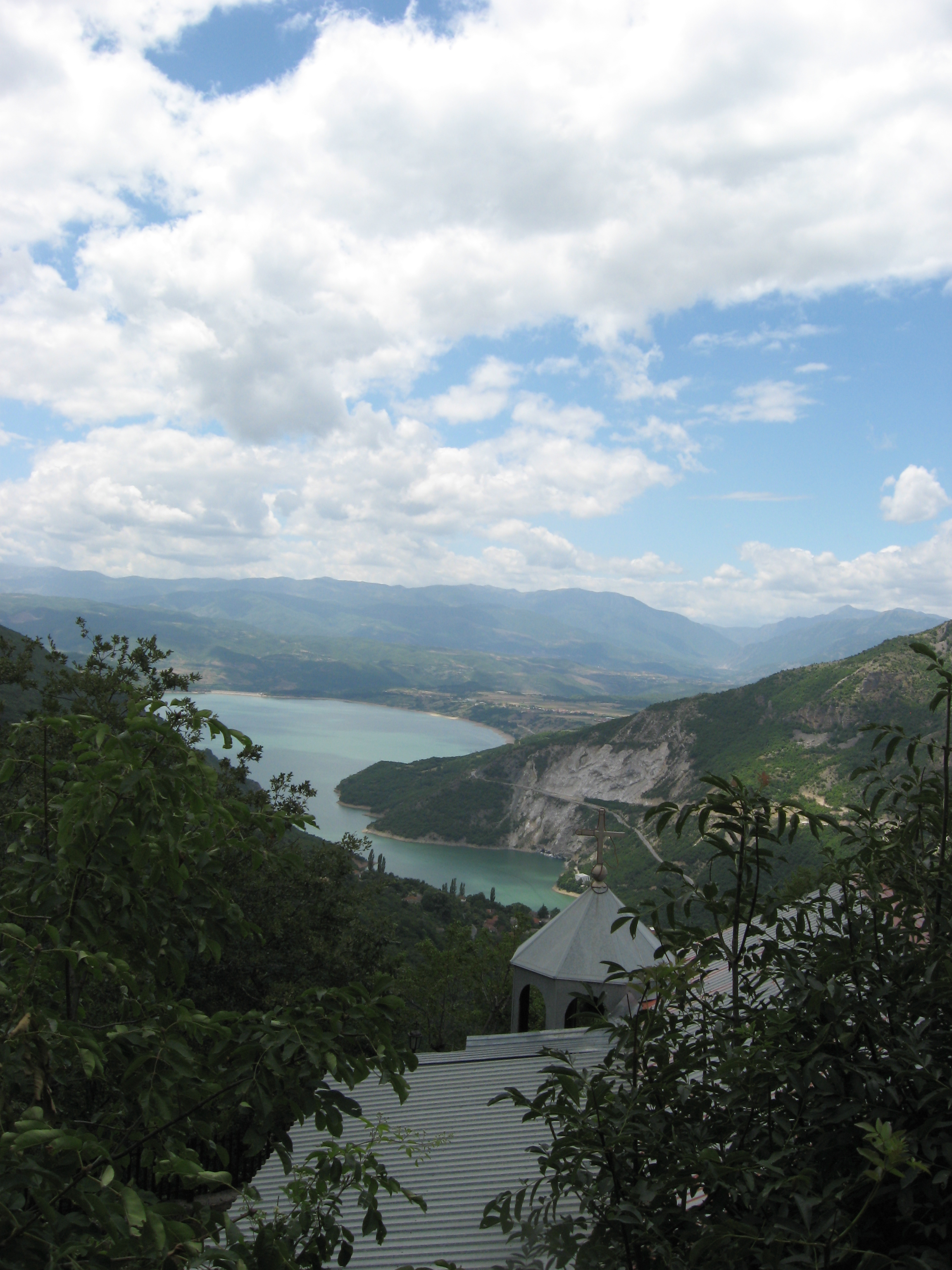 Црква Св. Врачи Кузман и Дамјан - Горно Мелничани